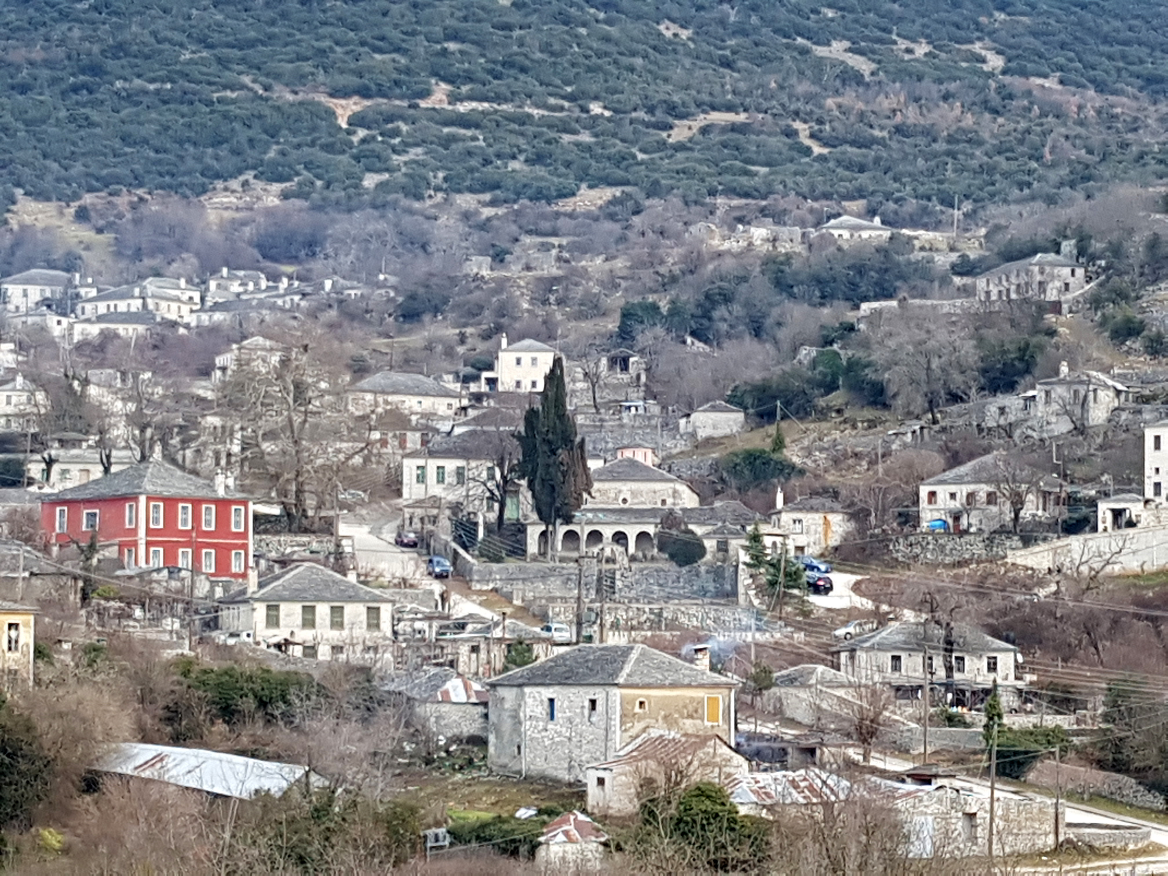 Ano Pedina en 2017. Anciennement Ano Soudena